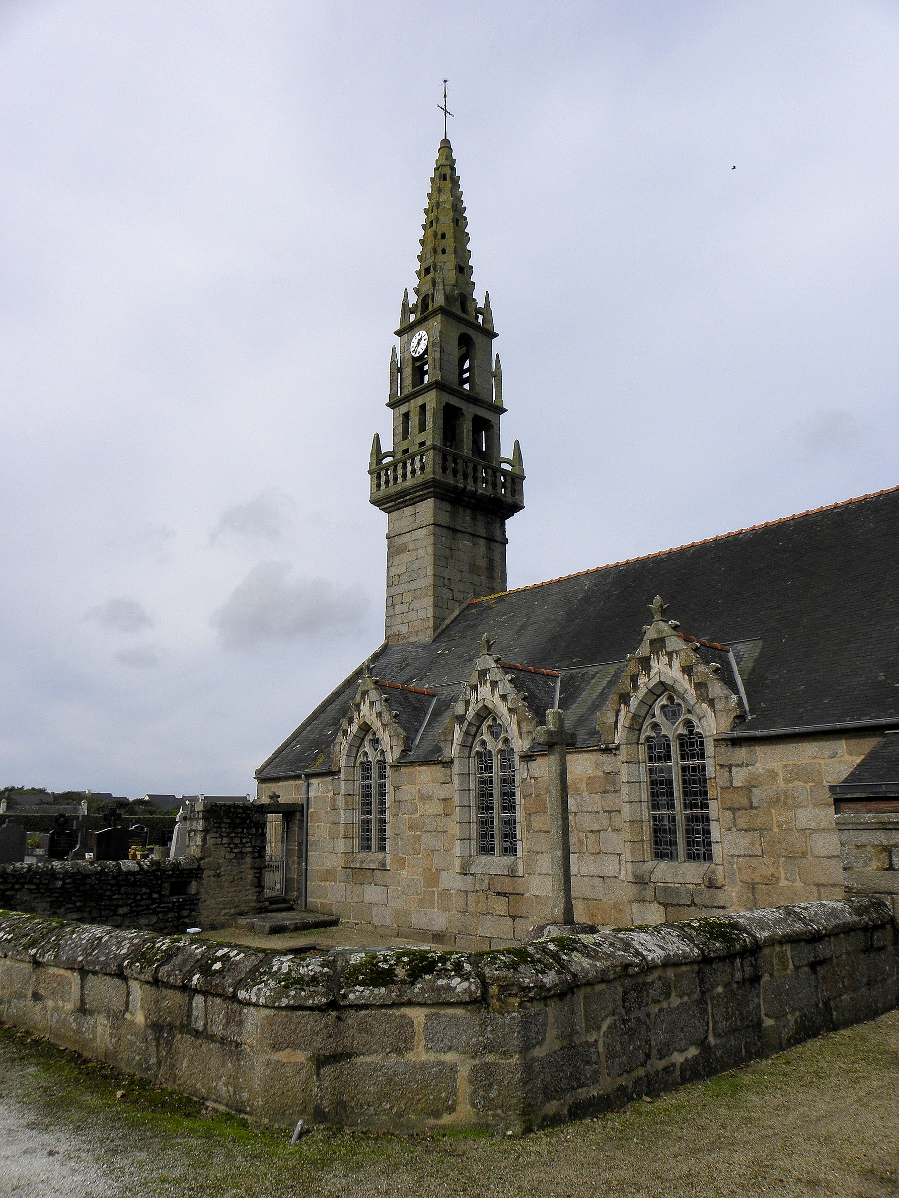 Église Saint-Rivoaré de Lanrivoaré (29). Flanc sud.